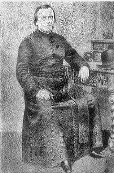 Siegmund Henrici, kath. Priester im Bistum Mainz, Buchautor, Konvertit, vorher prot. Pfarrer (1823-1884)